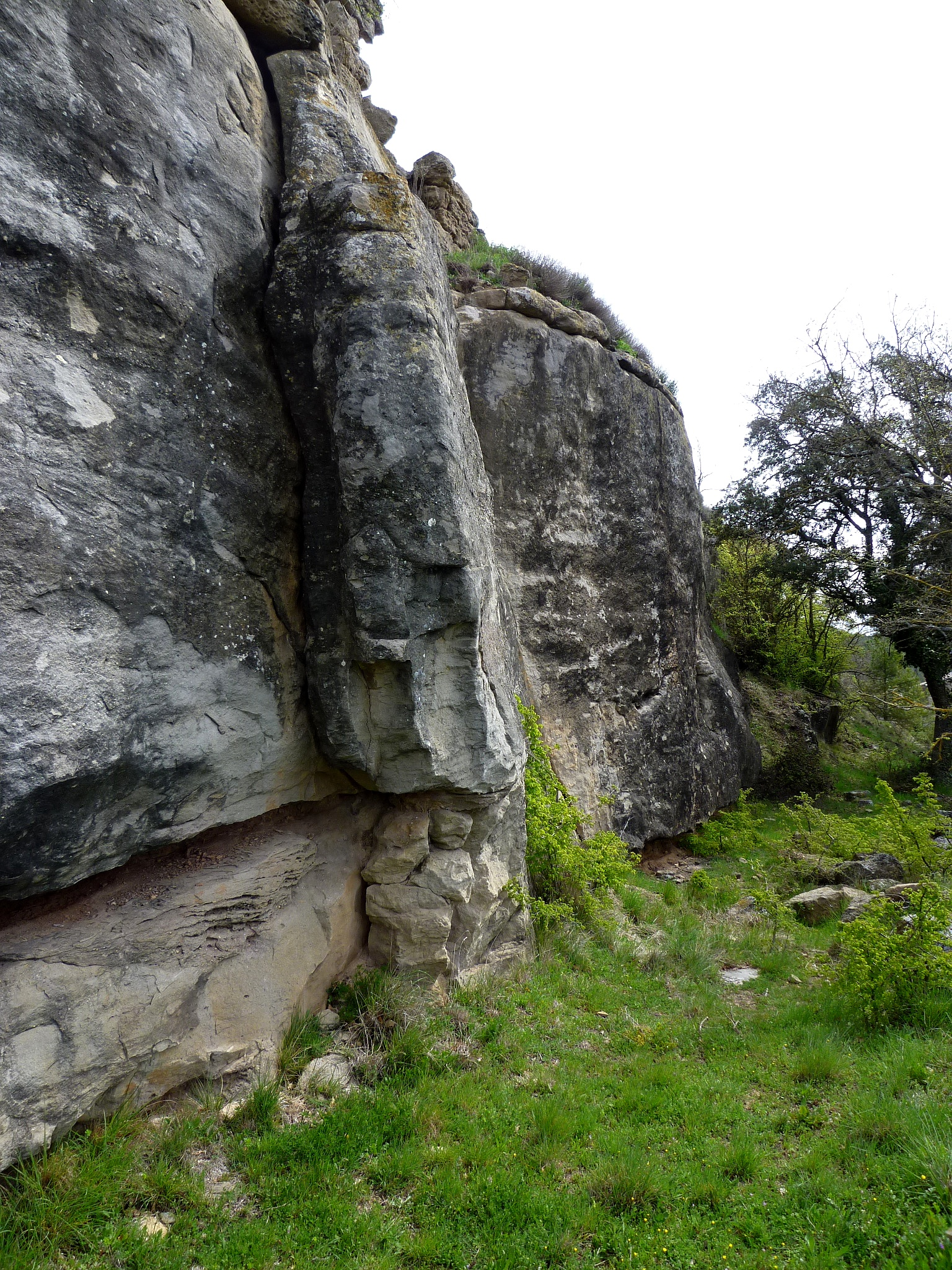 Castell de Llobera: camí de pujada i cingle a la base del castell